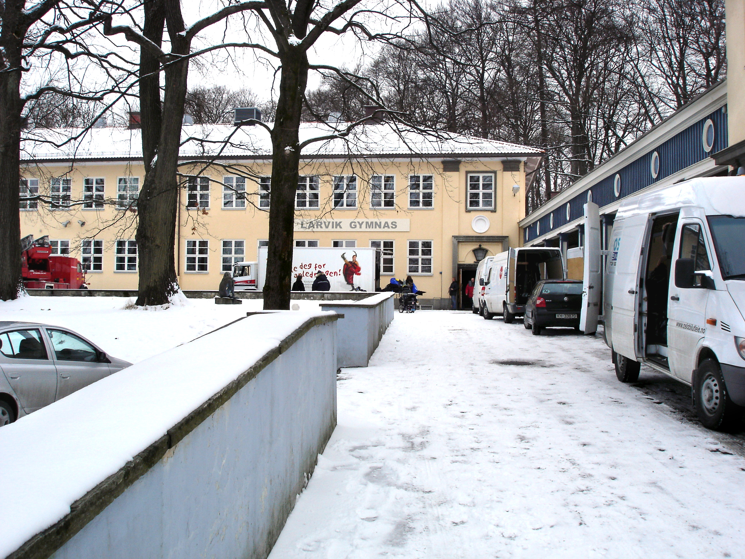 Bilde av Berg videregående skole under innspillingen av «Gymnaslærer Pedersen» (derfor navnet «Larvik gymnas»)